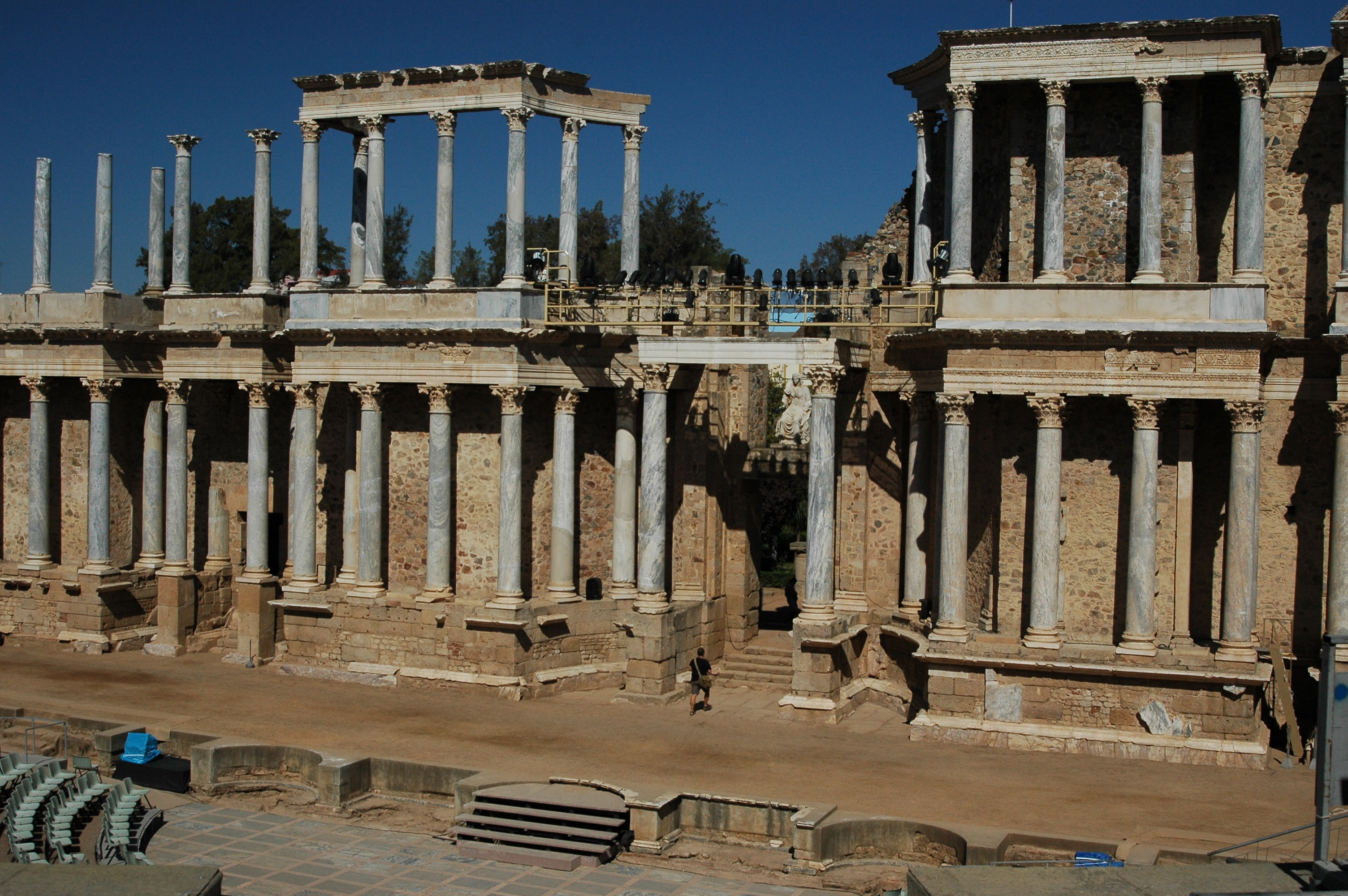 Merida Roman theatro